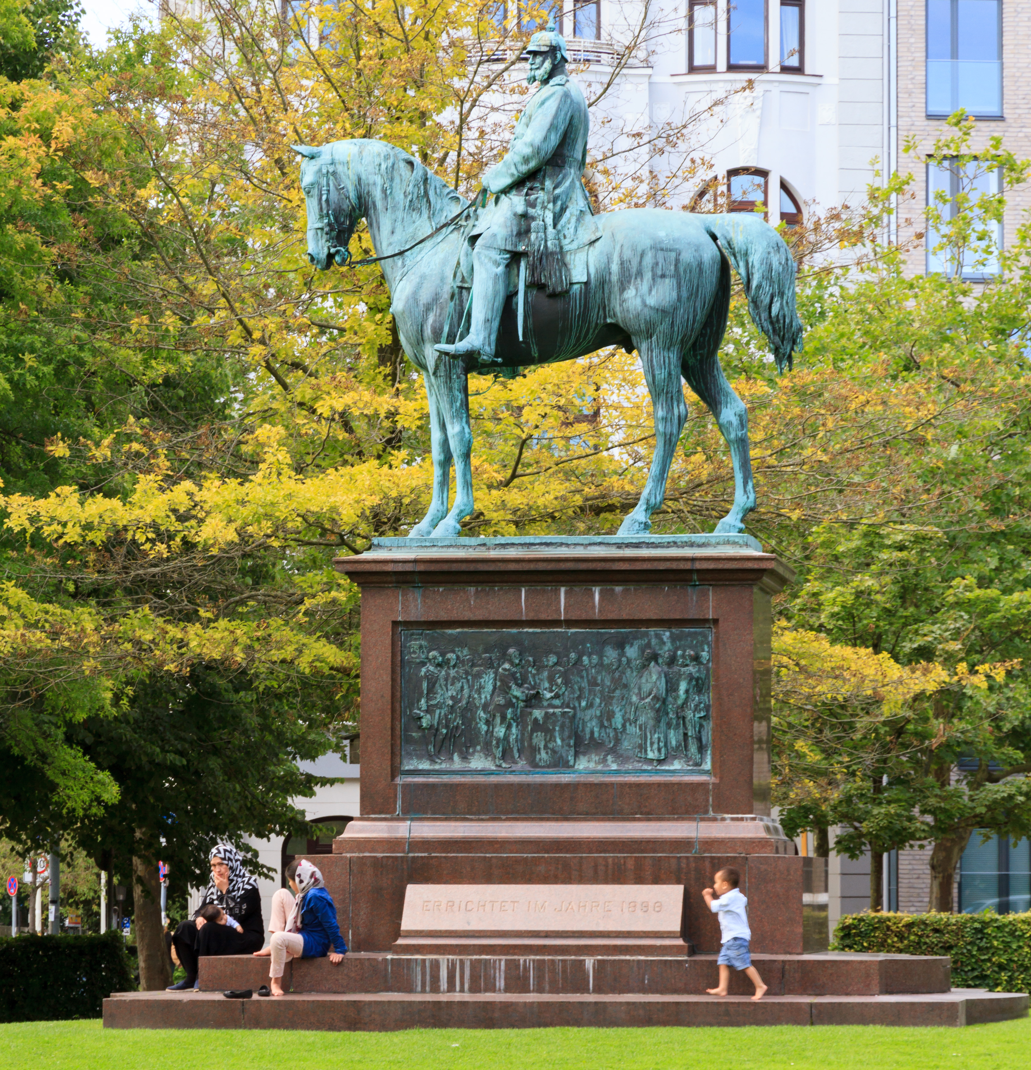 Das Kaiser-Wilhelm-I.-Reiterstandbild im Schlossgarten von Kiel.